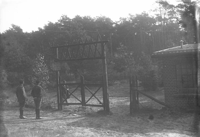 Zum kommenden Totensonntag! Der Friedhof der Namenlosen Wenigen nur dürfte es bekannt sein, dass sich vor den Toren der Stadt Berlin ein Selbstmörderfriedhof befindet, worauf die an den Klippen des irdischen Lebens zerschellten und freiwillig in den Tod gegangenen beigesetzt worden sind. Er liegt, gepflegt von mildtätigen Menschenhänden, in idyllischer Waldesruh im Grunewald bei Schildhorn b. Berlin! Der Eingang zu dem Friedhof der Namenlosen. An der Eingangspforte befindet sich folgende Inschrift: "Wanderer, der Du Dich nahest dieser Stätte des Friedens, schone die Steine, die Liebe gesetzt den Toten".